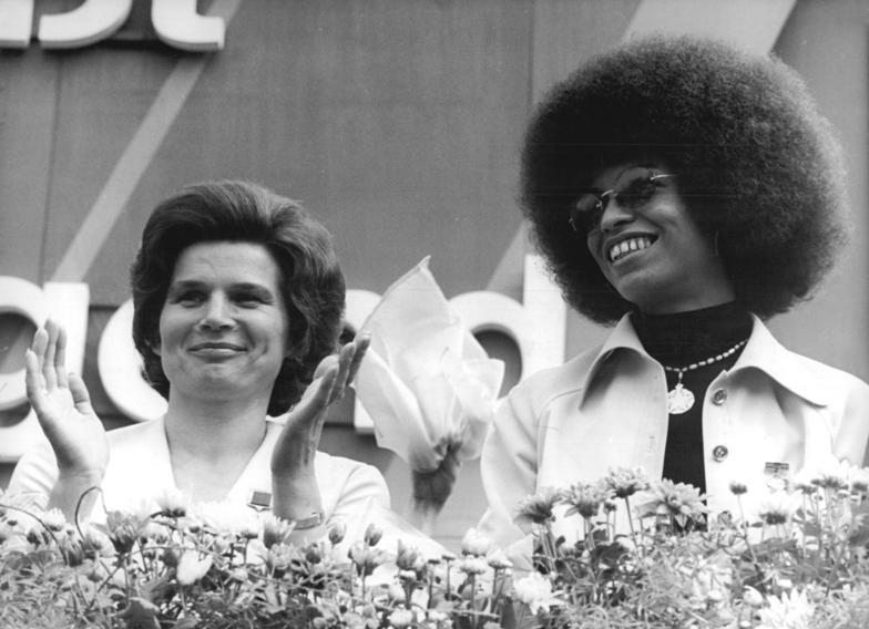 PI-APN-4.8.73 Berlin:Festival-Demonstration-Walentina Nikolajewa-Tereschkowa(l.) und Angela Davis, zwei große Vorbilder für die Jugend der Welt, waren am 4.8.73 unter den Ehrengästen der großen Demonstration der DDR-Jugend.